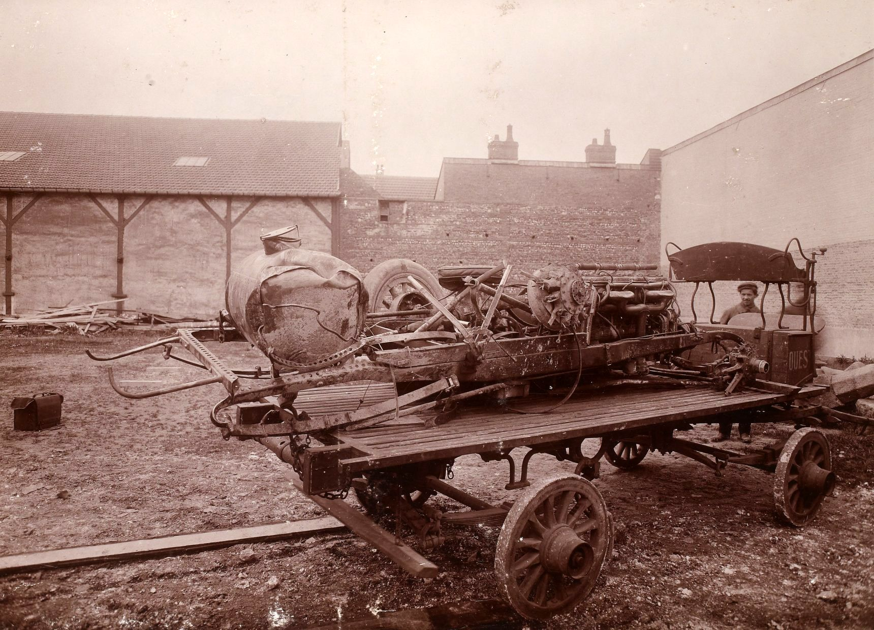 Débris de la voiture d'Albert Clément, après l'accident qui lui coûta la vie le 17 mai 1907.